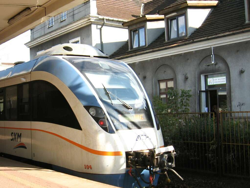 14WE electric multiple unit at Pruszkow train station